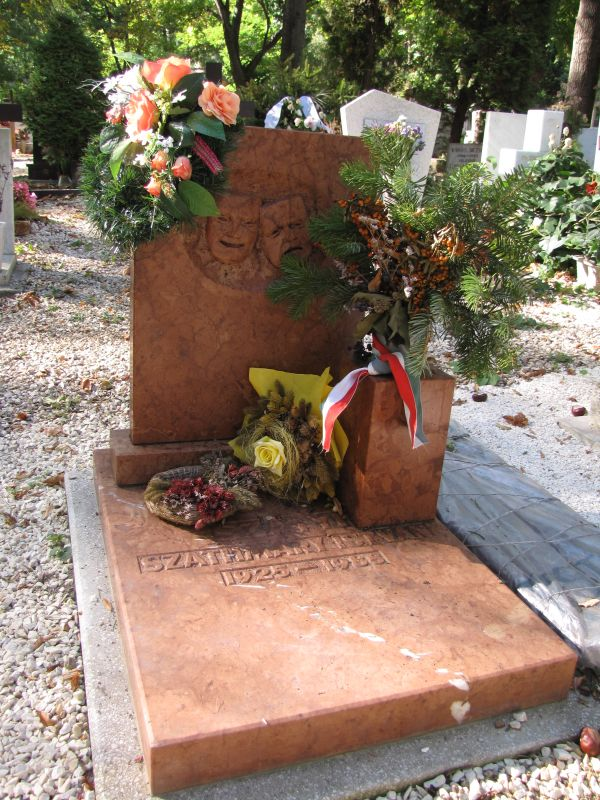 Szatmári István, olykor Szathmáry, Szathmári (Budapest, 1925. július 30. – 1988. december 28.) színművész sírja Budapesten. Farkasréti temető: 2/8-1-138.